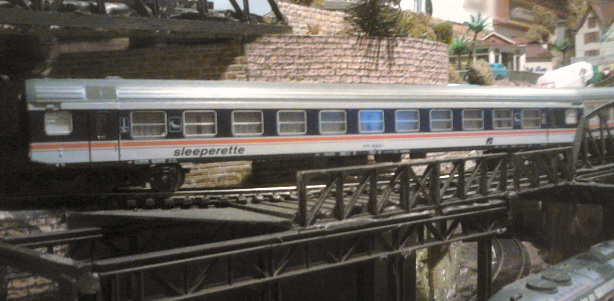 Modello Lima in scala H0 di carrozza "Sleeperette" delle FS italiane.